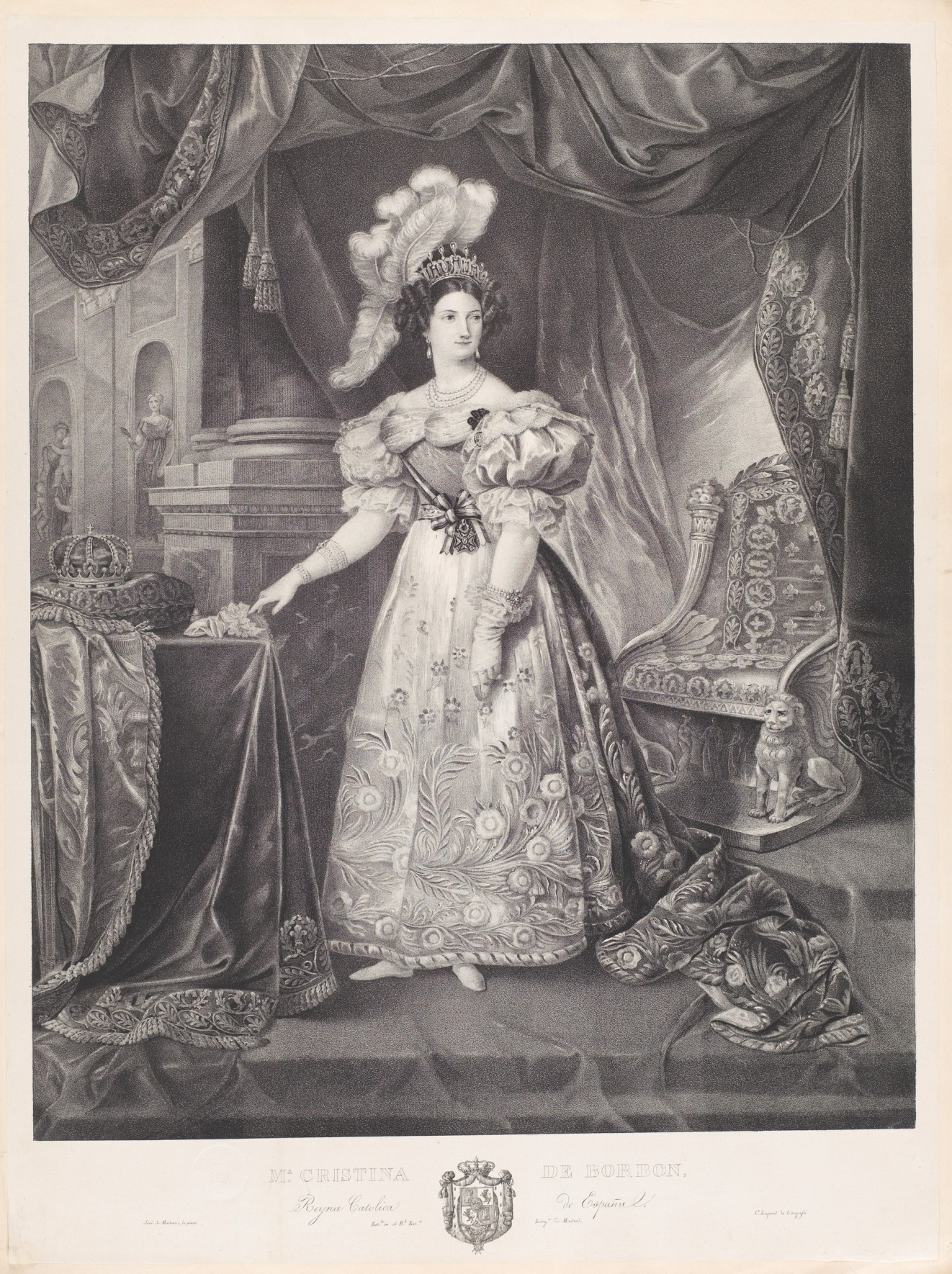 Retrato de la reina María Cristina de Borbón del tomo II de la Colección litográfica de cuadros del rey de España el señor don Fernando VII